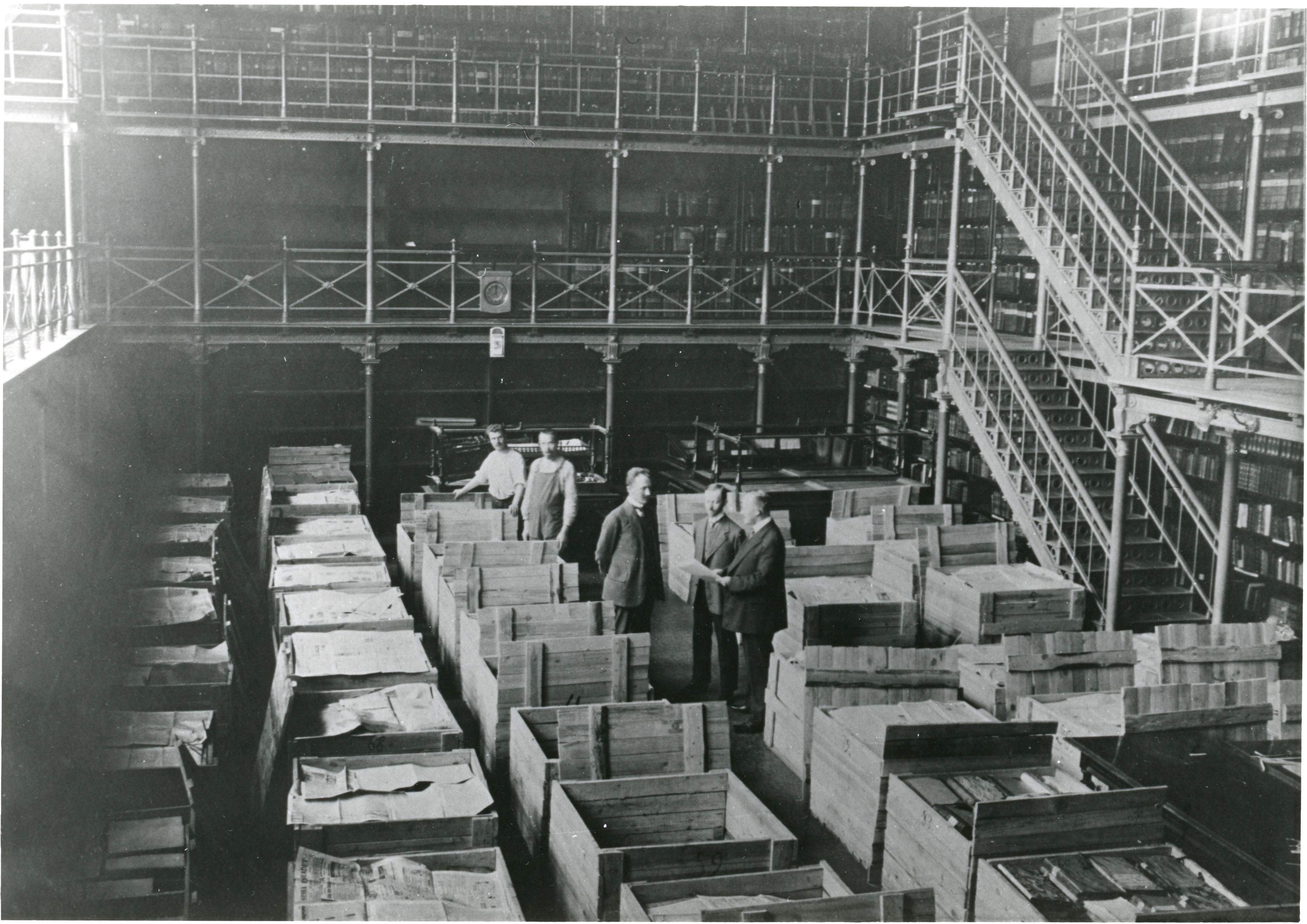 Valtionarkiston asiakirjojen siirtoa pois Helsingistä sodan jaloista elokuussa 1914.